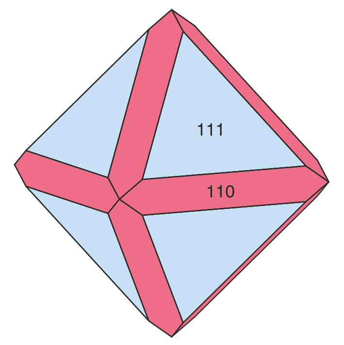 Zeichnung eines Hydroxykenomikrolith-Kristalls mit dem Oktaeder {111} als dominierender Flächenform, modifiziert durch das Rhombendodekaeder